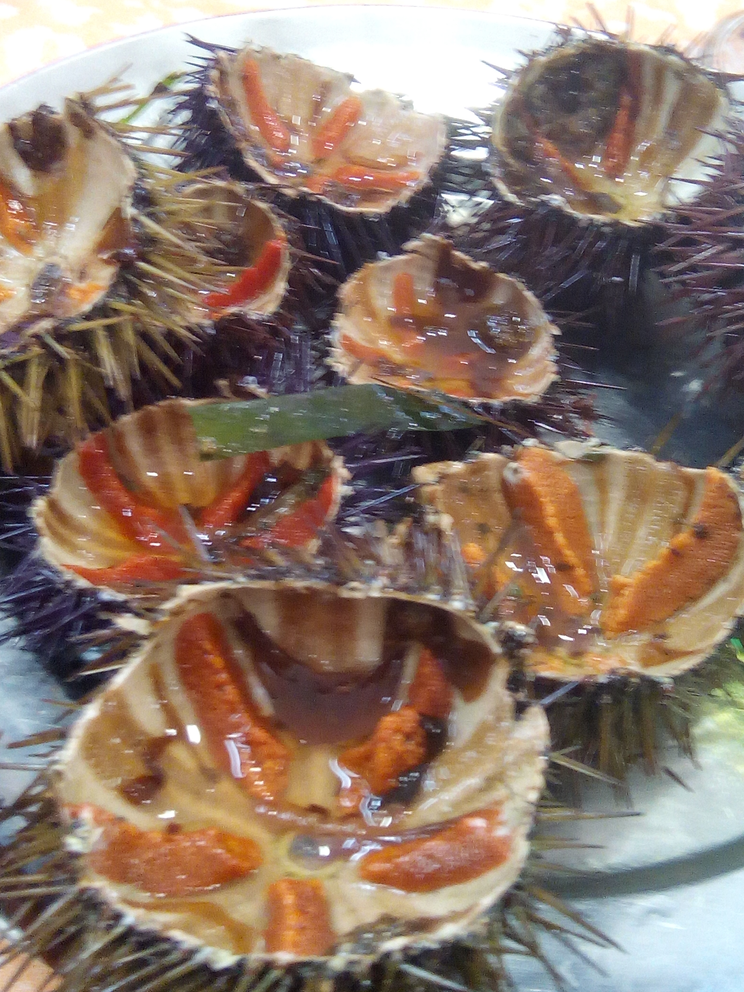 Ricci di mare pescati nel trapanese